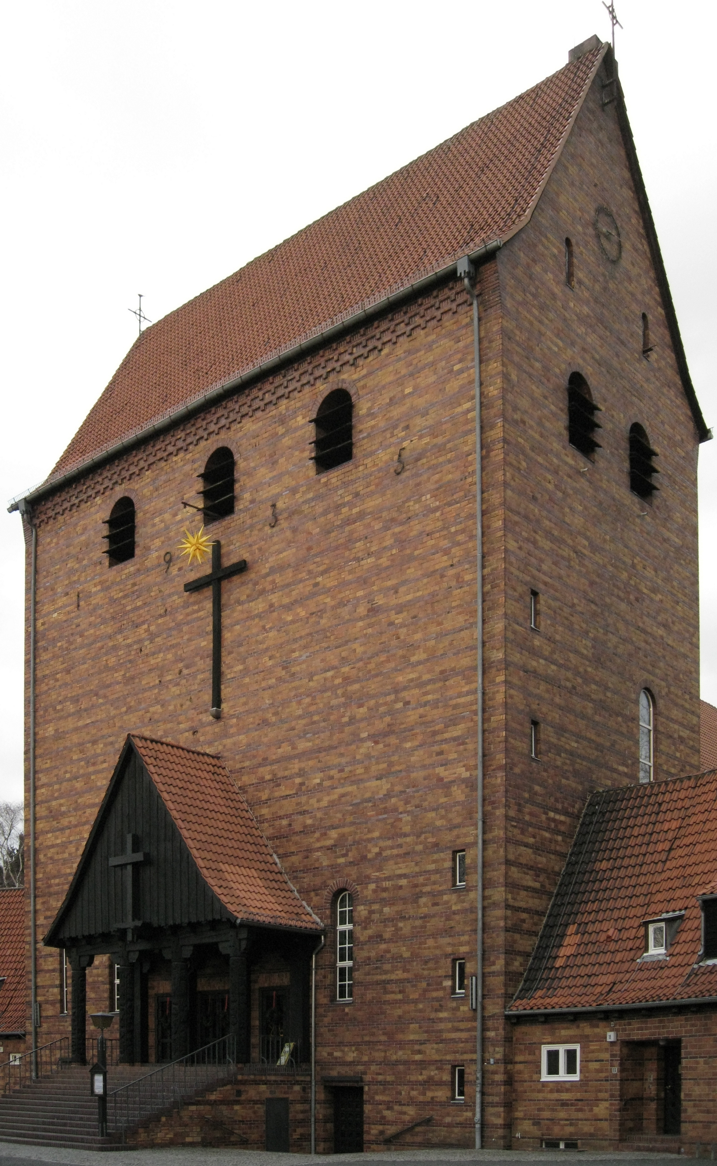 Portalturm der Johanneskirche